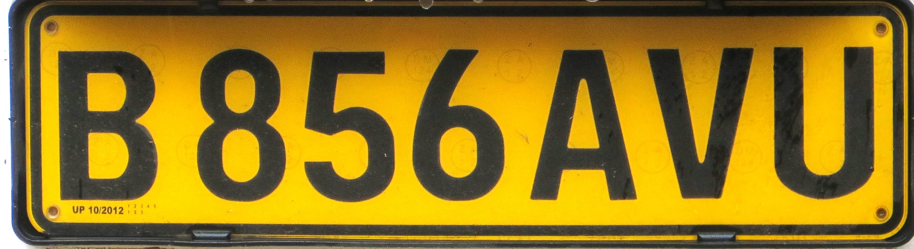 Kentekenplaat uit Botswana